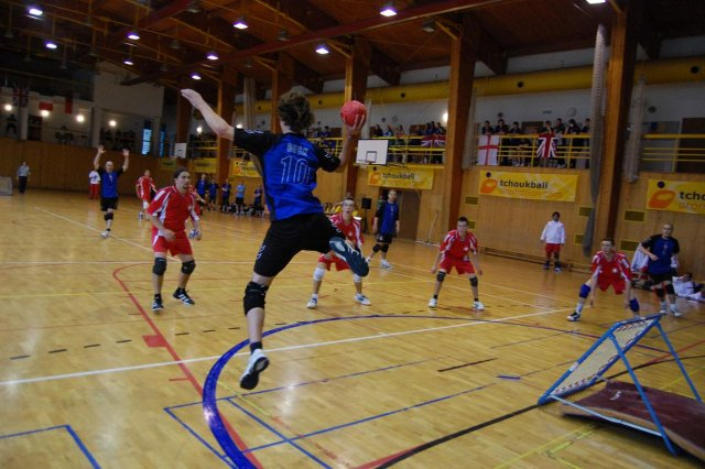 Tchoukball_vimi.jpg